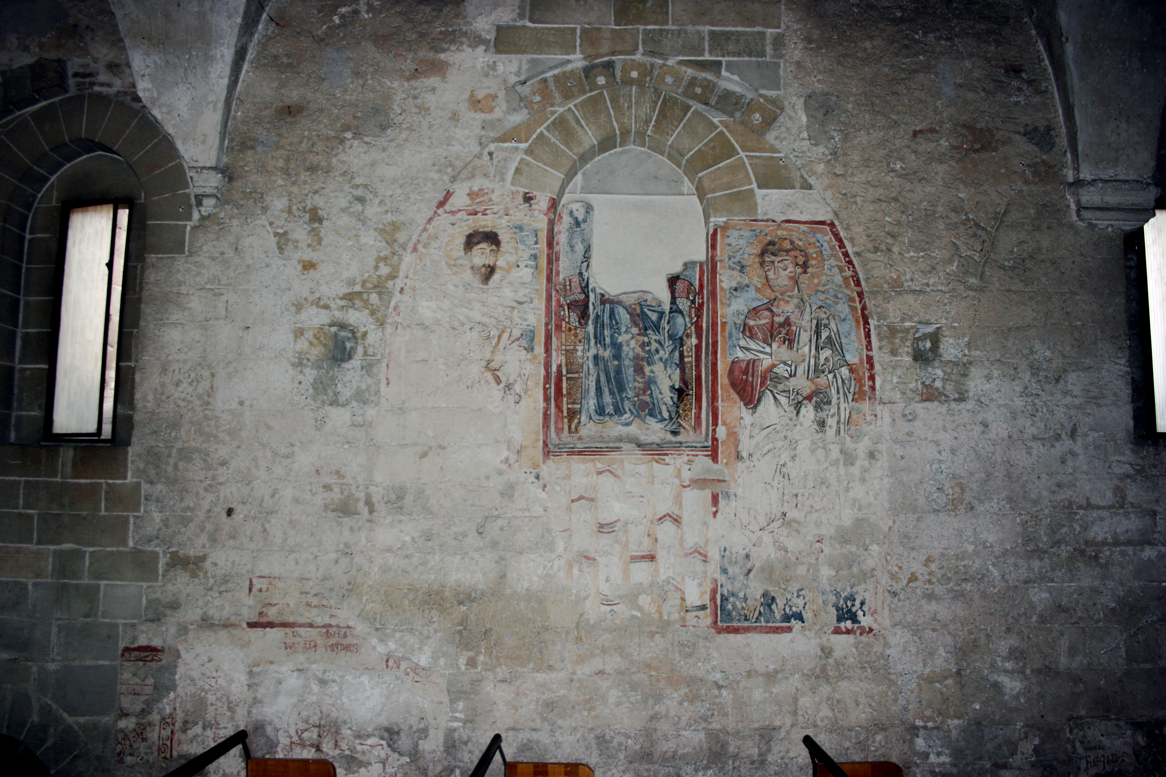 San giovanni degli eremiti